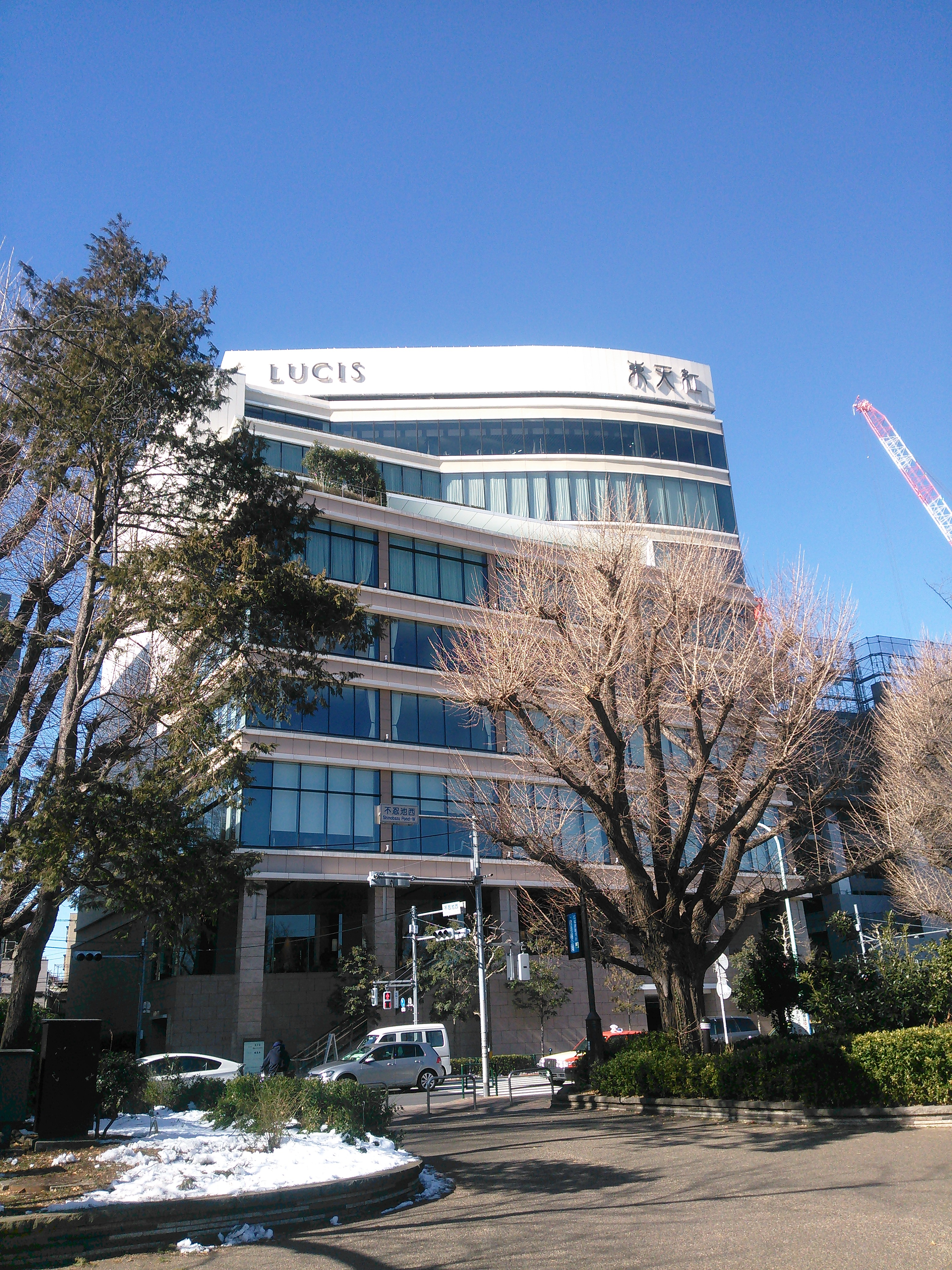 東京都台東区池之端、東天紅上野本店（2015年開店の、新店舗）